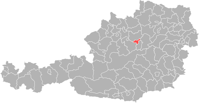 Waidhofen an der Ybbs in Österreich